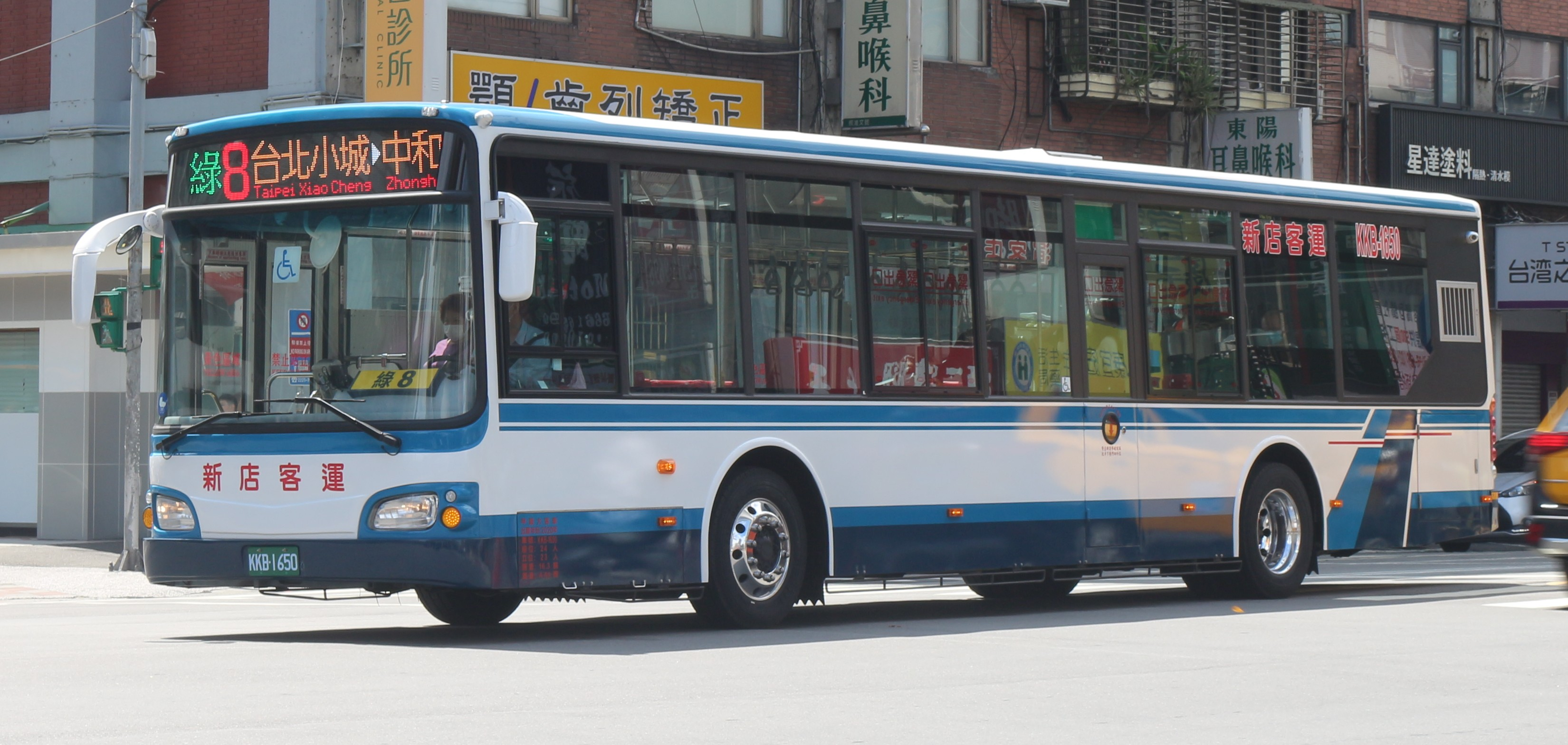 新店客運首部六期日野2020 HINO HS2ARXL-UTF 低地板公車 KKB-1650 綠8